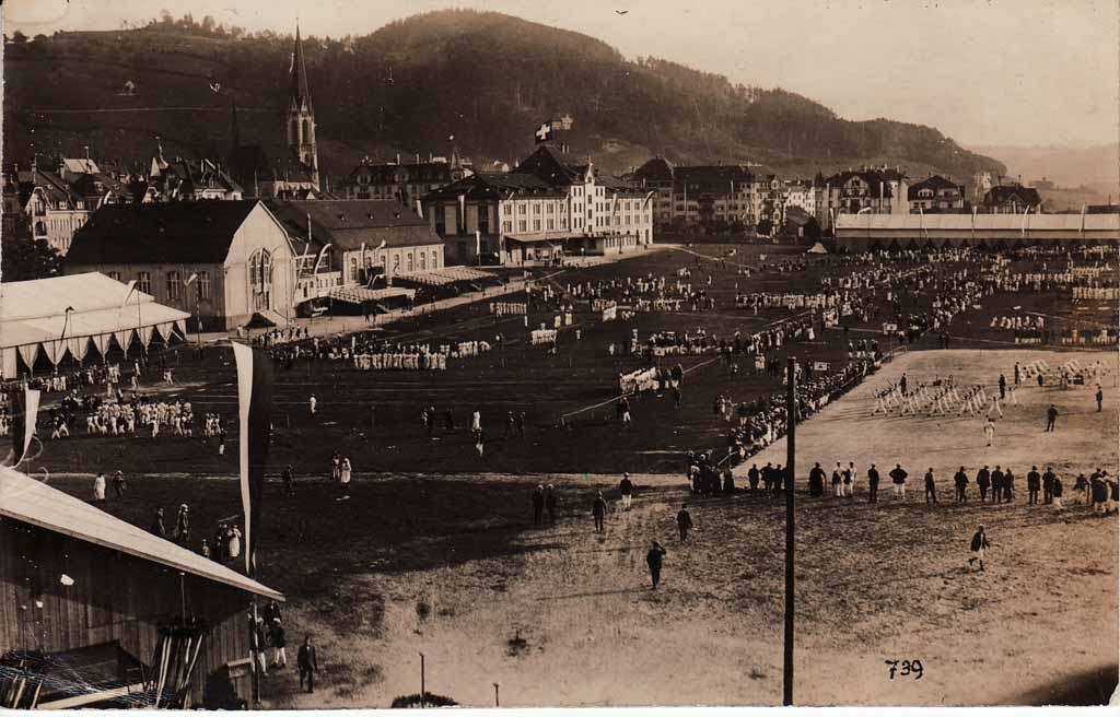 Eidgenössisches Turnfest vom 21. - 25. Juli 1922 auf der Sportanlage Kreuzbleiche in St. Gallen, Schweiz